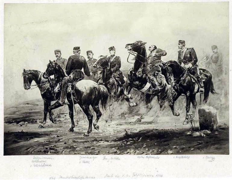 Stab der Königlich Württembergischen Felddivision bei Tauberbischofsheim (Baden-Württemberg), sieben Offiziere zu Pferd in Uniform, teils mit Schärpe und Mütze, ein Offizier angeschossen (von links nach rechts): Ellrichshausen, Joseph Adolf Friedrich Freiherr von; Politiker, Abgeordneter, 1832-1906 Unbeschriftet Kallee, Eduard (von); General, 1818-1888 Prinz Willhelm Hofmeister, Hauptmann Wiederhold, Karl Friedrich Kuno Freiherr von; Generalleutnant und Kriegsminister, 1809-1885 Hardegg, Oskar von; Generalleutnant, Kriegsminister, 1815-1877